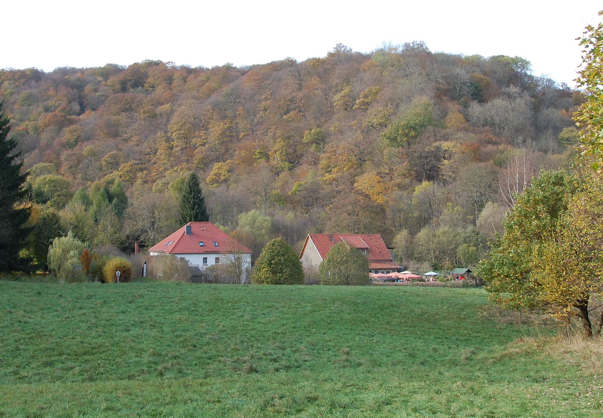 IV. Hammer, Mägdesprung; abgebildeter Bereich mit Ausnahme der Siedlungslage im Naturschutzgebiet „Oberes Selketal“